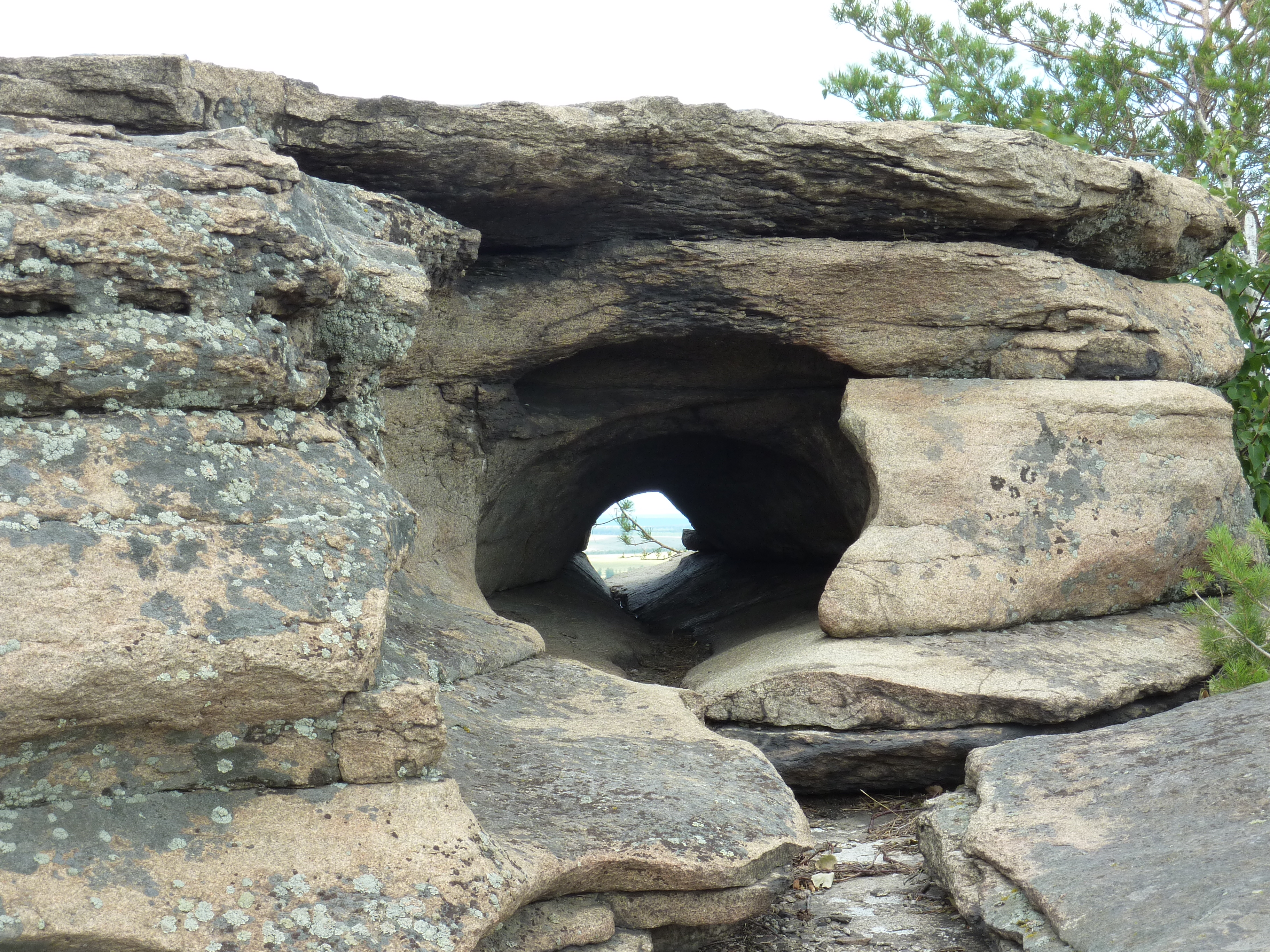 Отверстие в скале